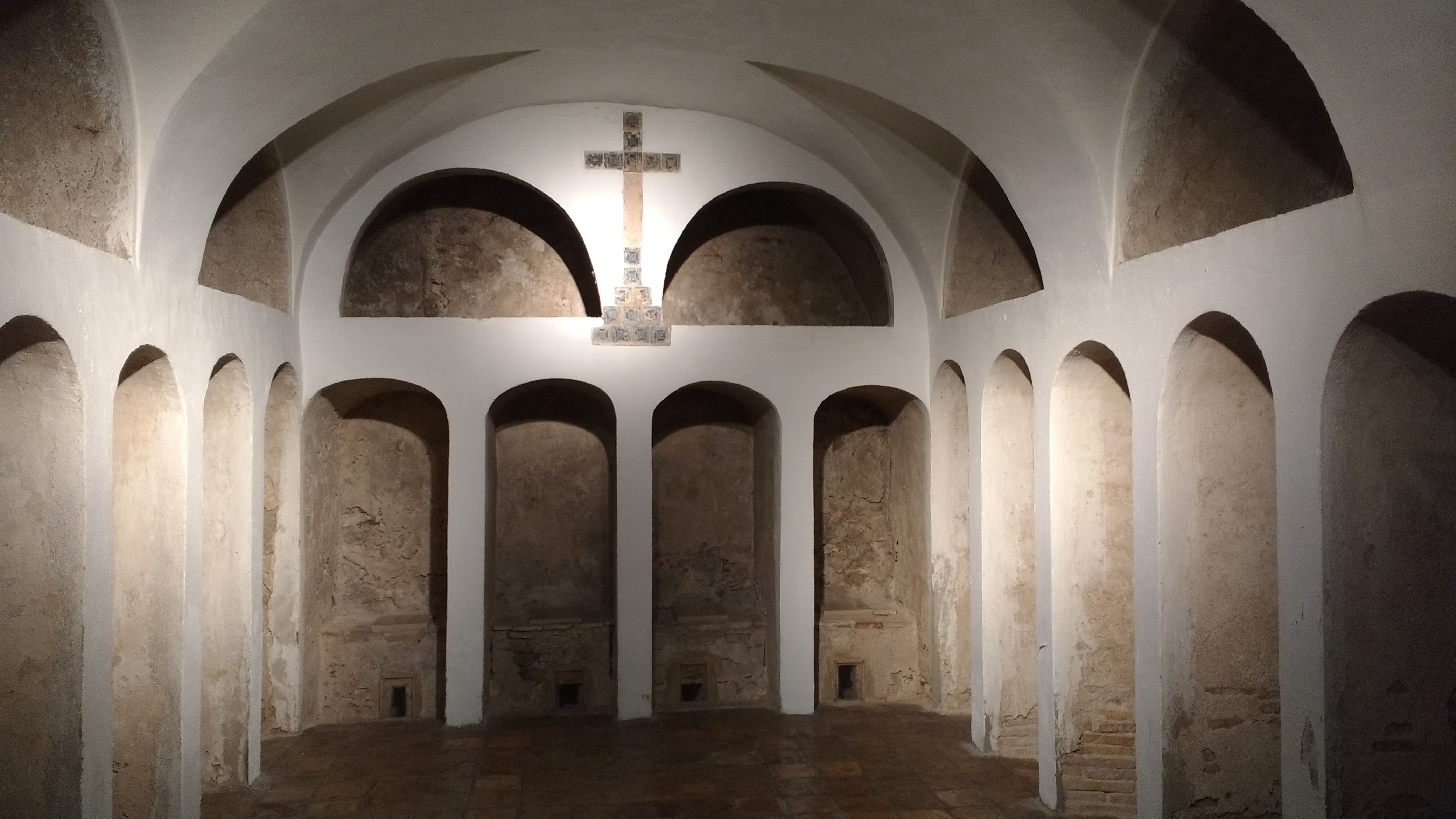 Fotografia del cementiri de l'antic Convent de Sant Antoni de Pàdua.